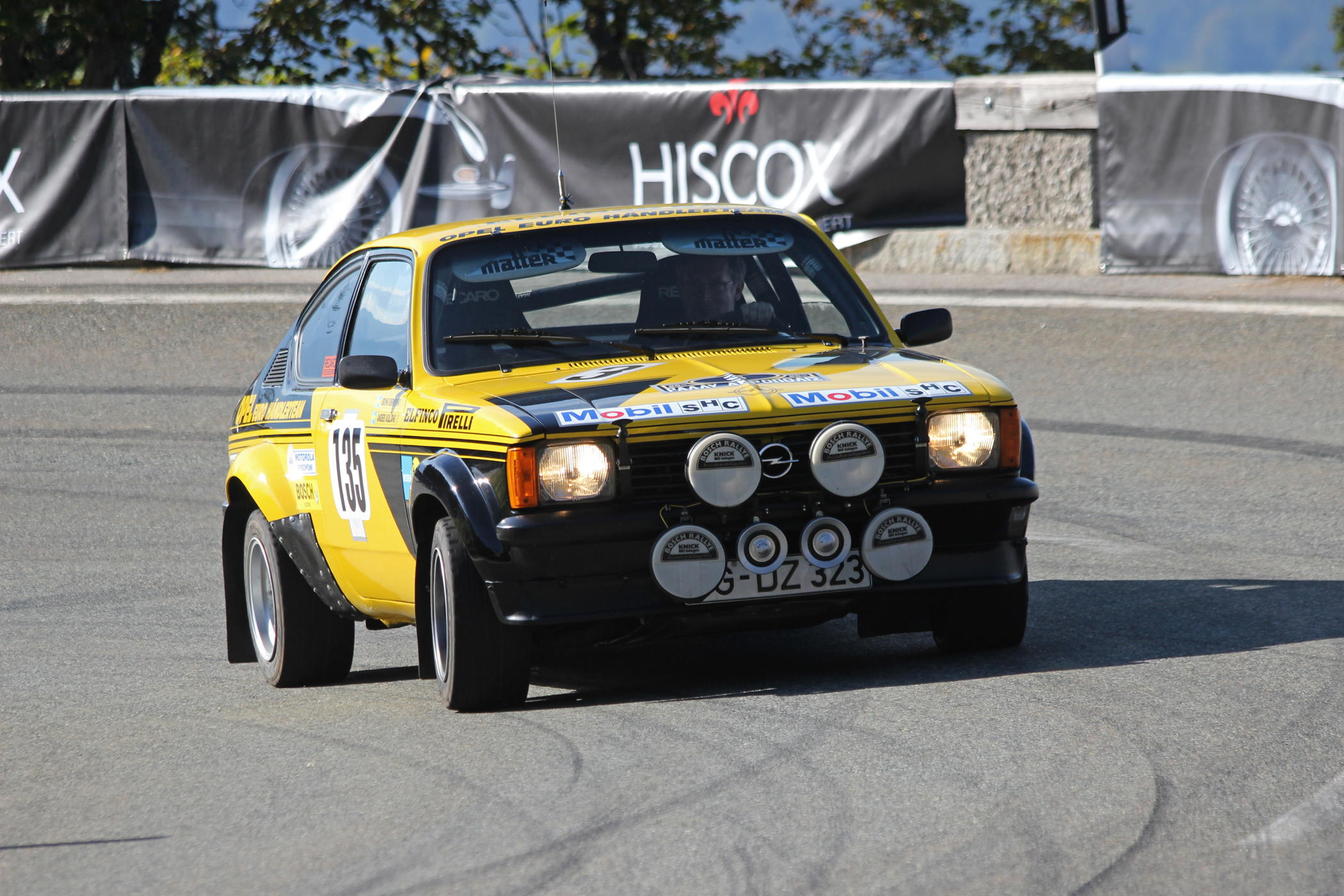 Opel Kadett GT/E - Walter Röhrls Rallye-WM-Fahrzeugtyp 1976-1977